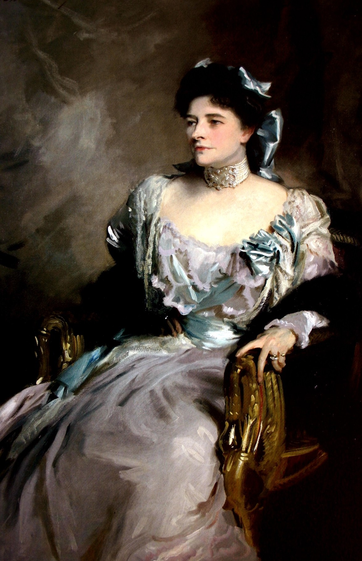 Alice Wernher born Alice Sedgwick Mankiewicz